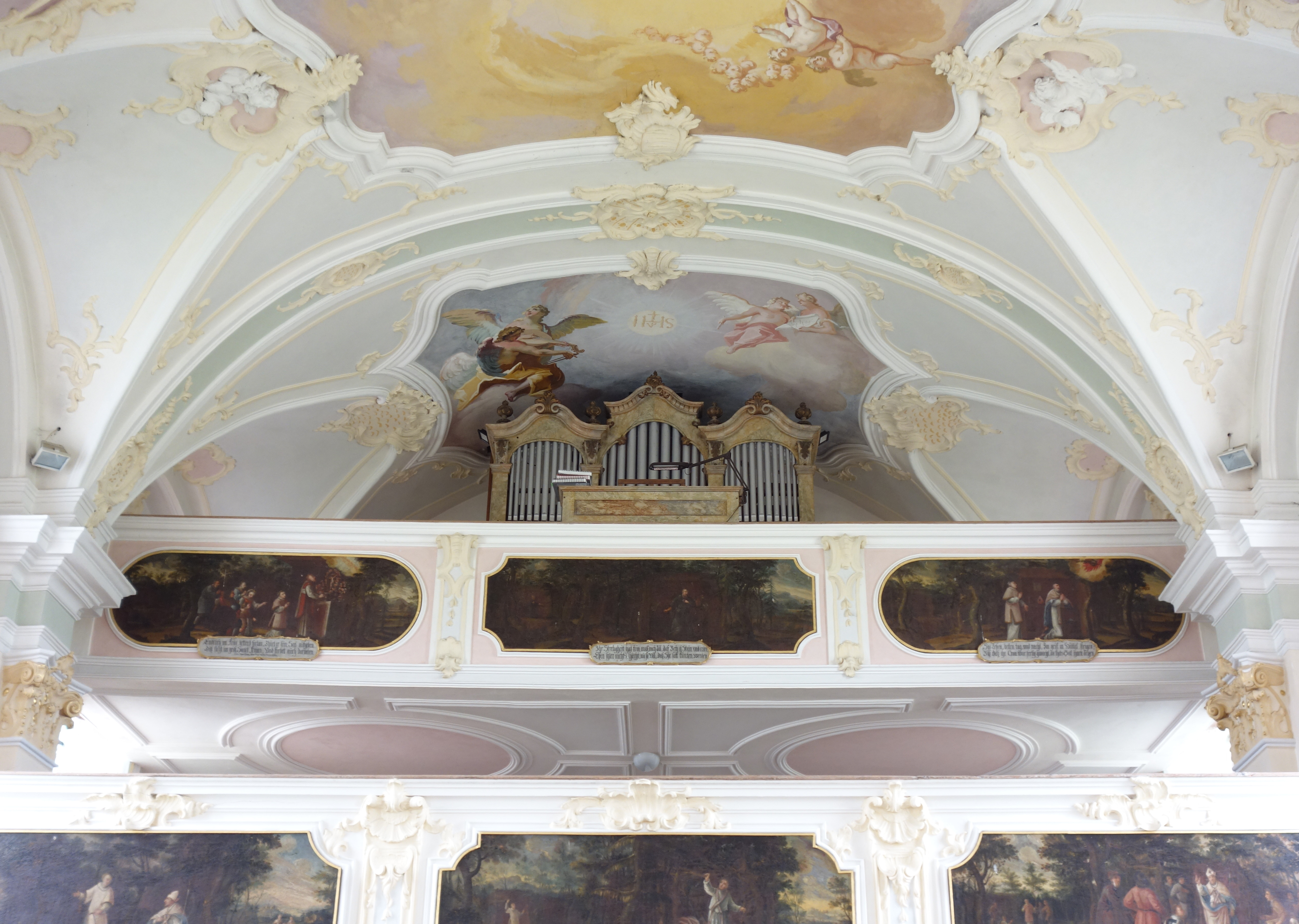 Die Maerz-Orgel der Wallfahrtskirche in Wilparting (1897, Franz Borgias Maerz, I/7)